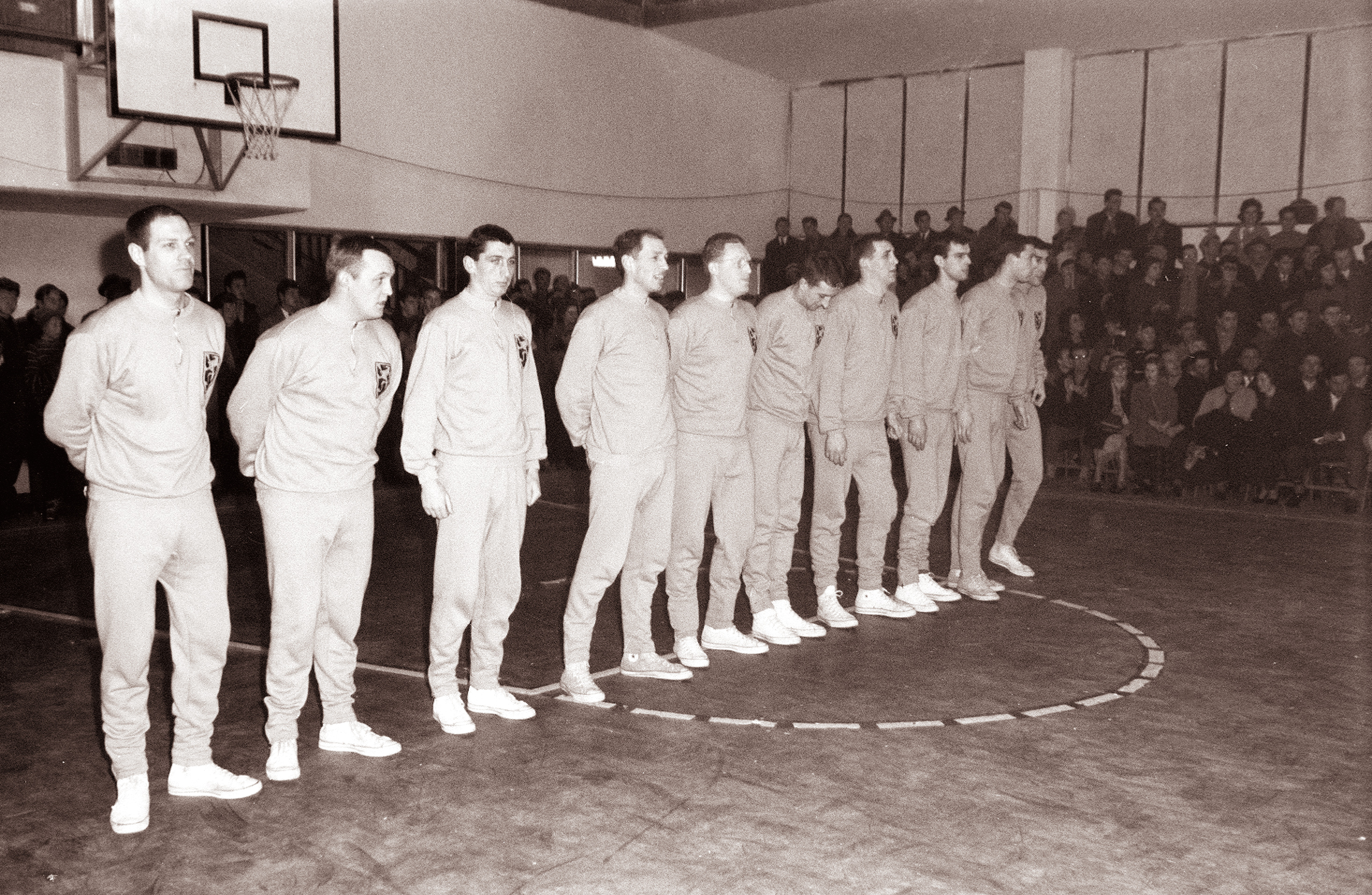 Košarka Jugoslavija-Belgija.